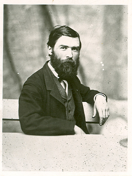 Porträt von Laurenz Heinrich Hetjens, Fotografie, 1865 Halbporträt sitzend von Laurenz Heinrich Hetjens